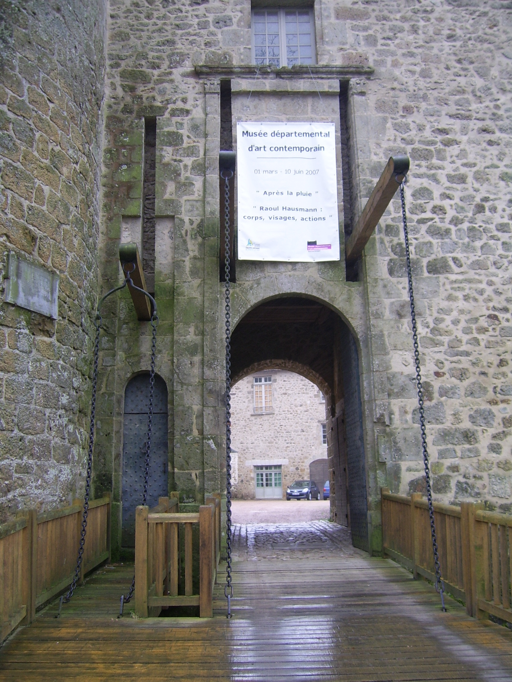 Entrée du château-musée de Rochechouart, Haute-Vienne, France